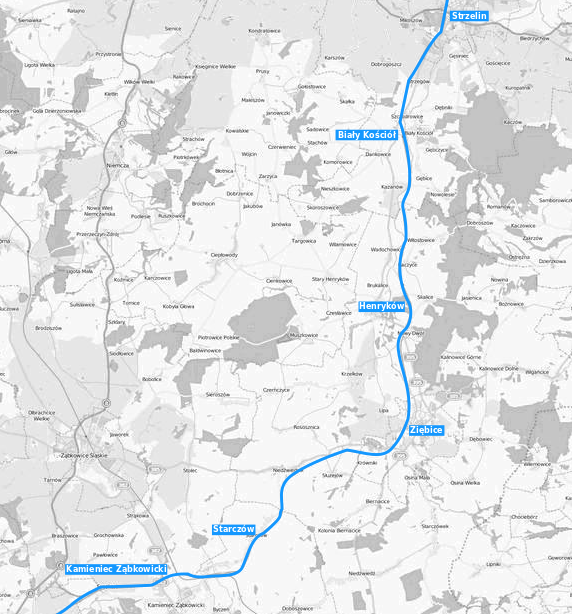 Mapa linii kolejowej Strzelin - Kamieniec Ząbkowicki